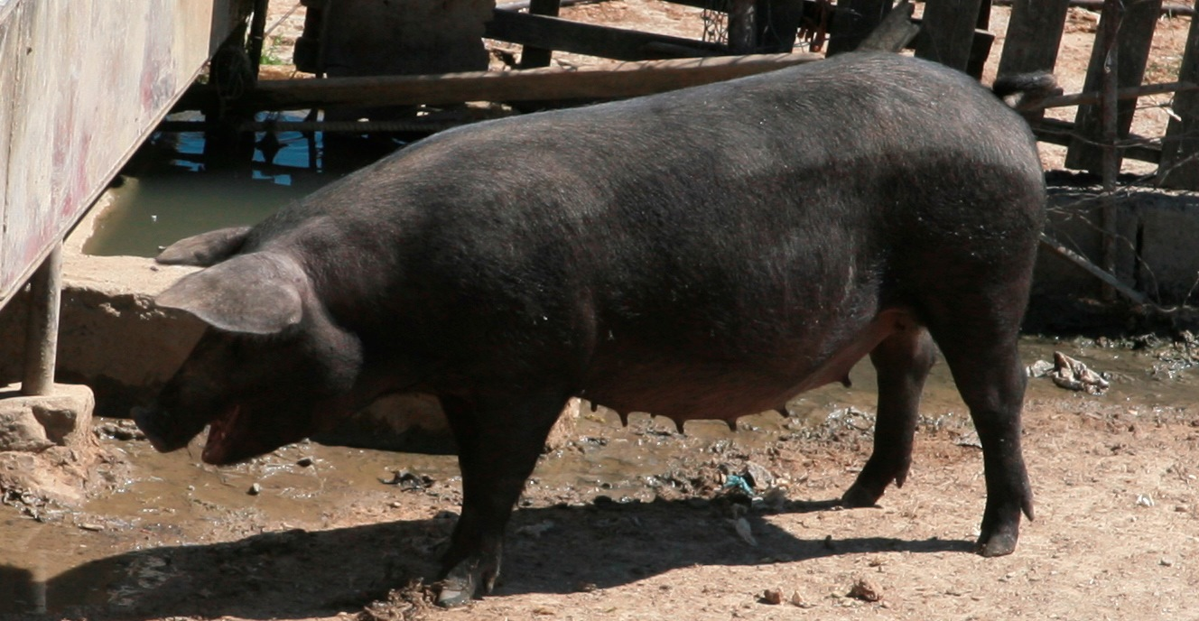 Suino Nero dei Nebrodi, anche chiamato suino Nero Siciliano o suino Nero delle Madonie, in una fattoria vicino Capizzi.